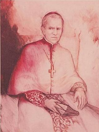 Bozzetto del ritratto del Patriarca Paolo Angelo Ballerini per il museo arcivescovile di Milano